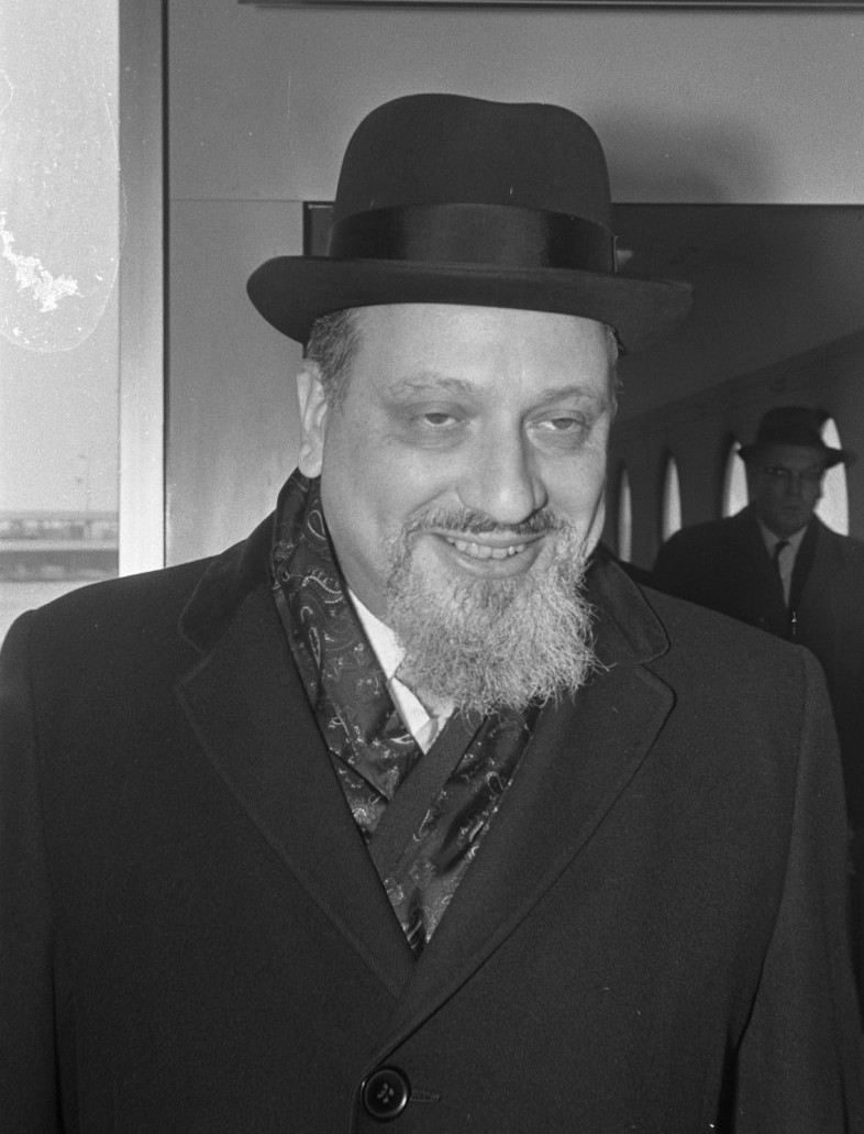 Dr. Immanuel Jakobovits , opperrabbijn van Engeland, kop